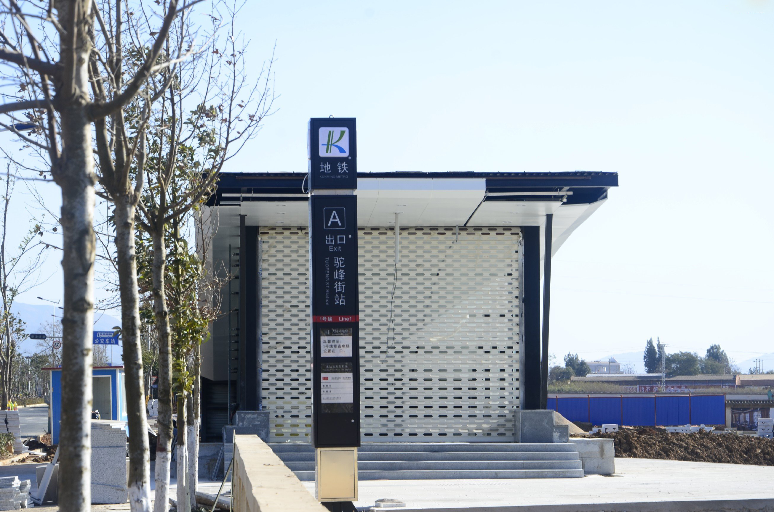 昆明轨道交通驼峰街站